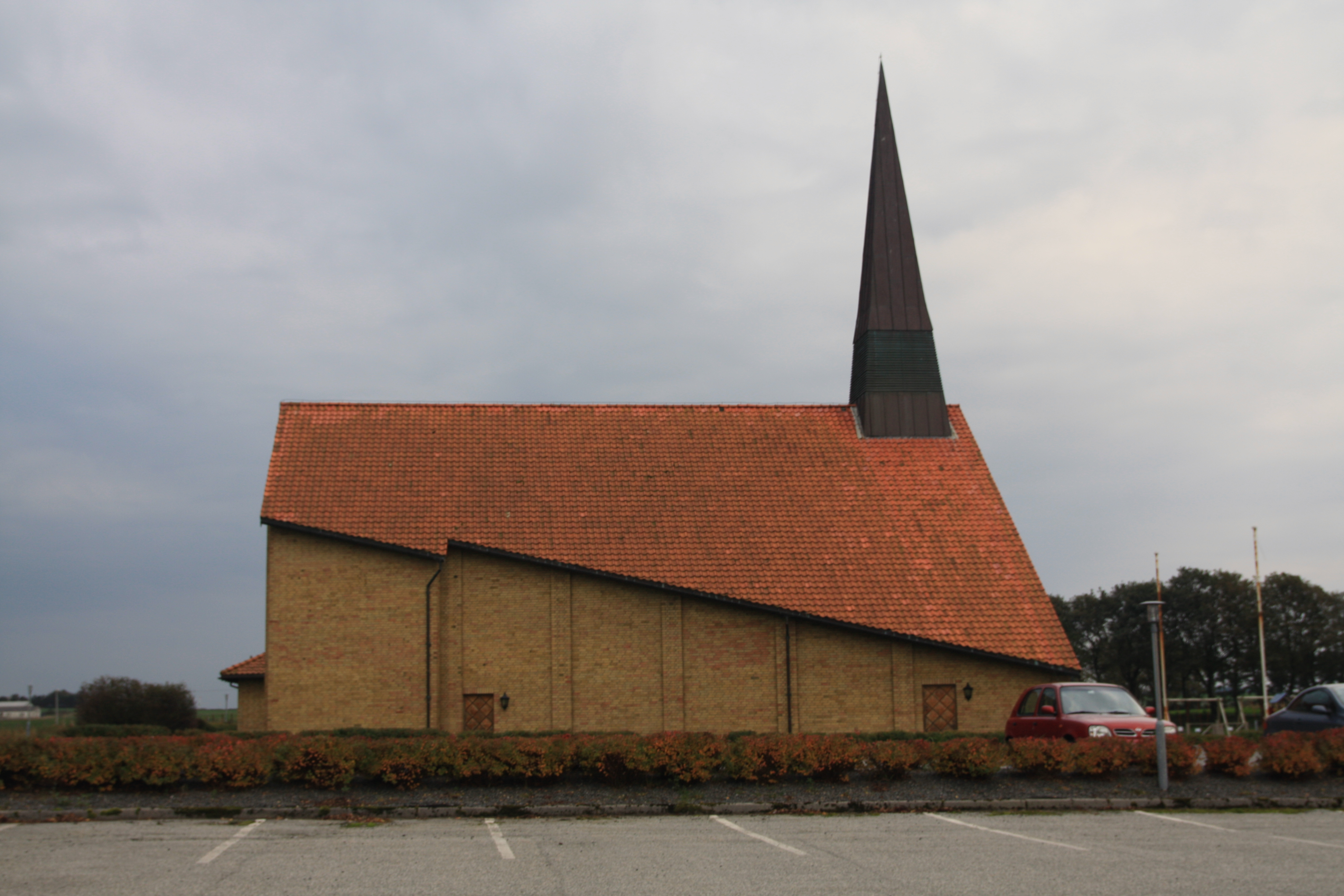 Nærlandsheimen kyrkjestad